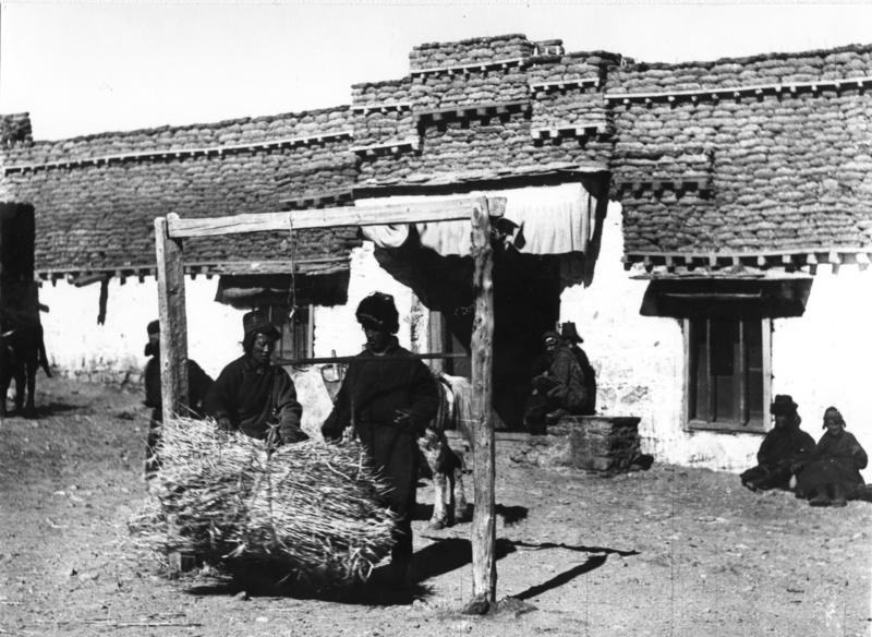 Phari Dzong, vor einem Haus eine Waage, auf der Futtergetreide (Futterstroh) gewogen wird (für Karawanen)